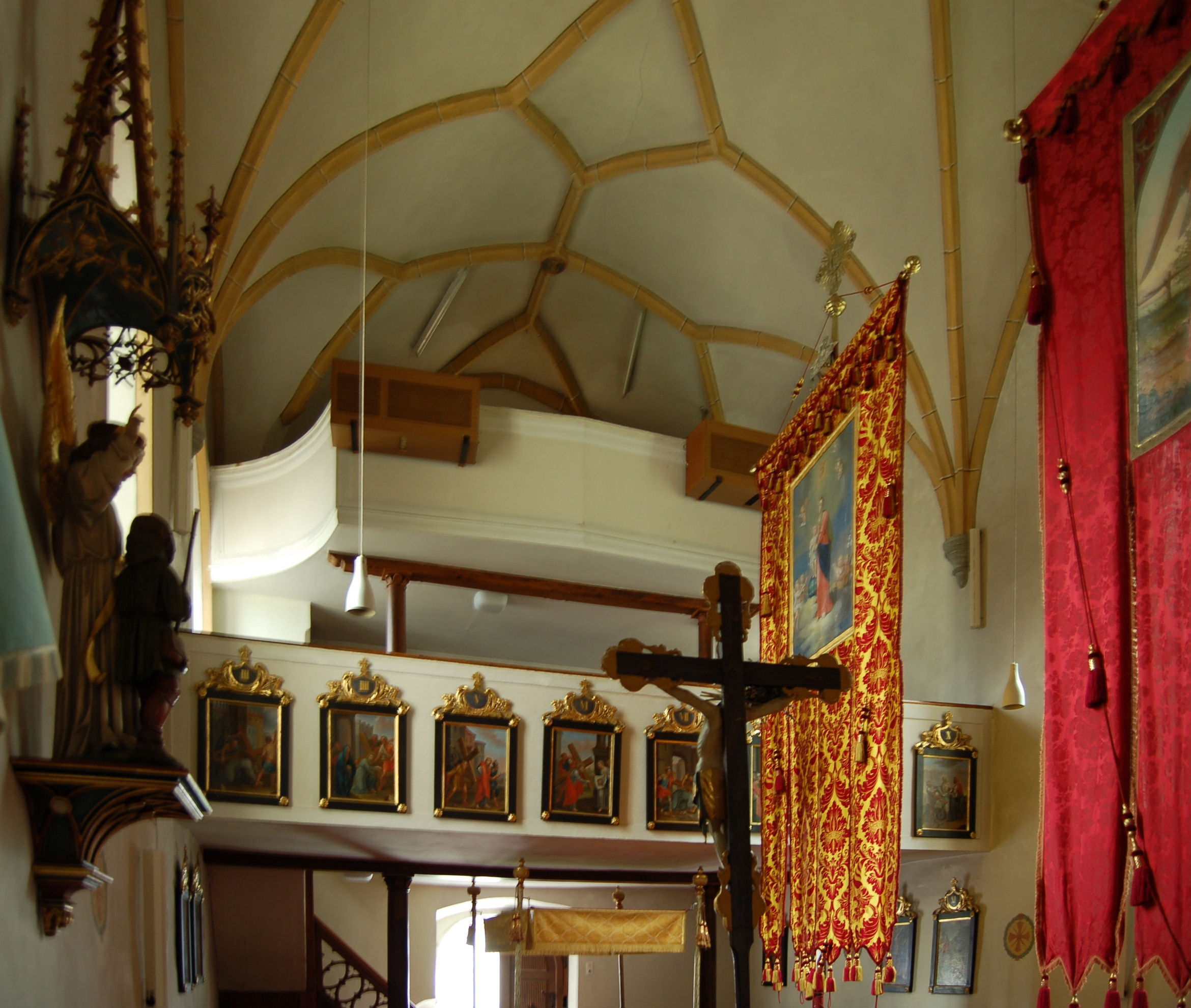 Die denkmalgeschützte Pfarrkirche in Grafendorf (Gemeinde Gaimberg) im Bezirk Lienz.